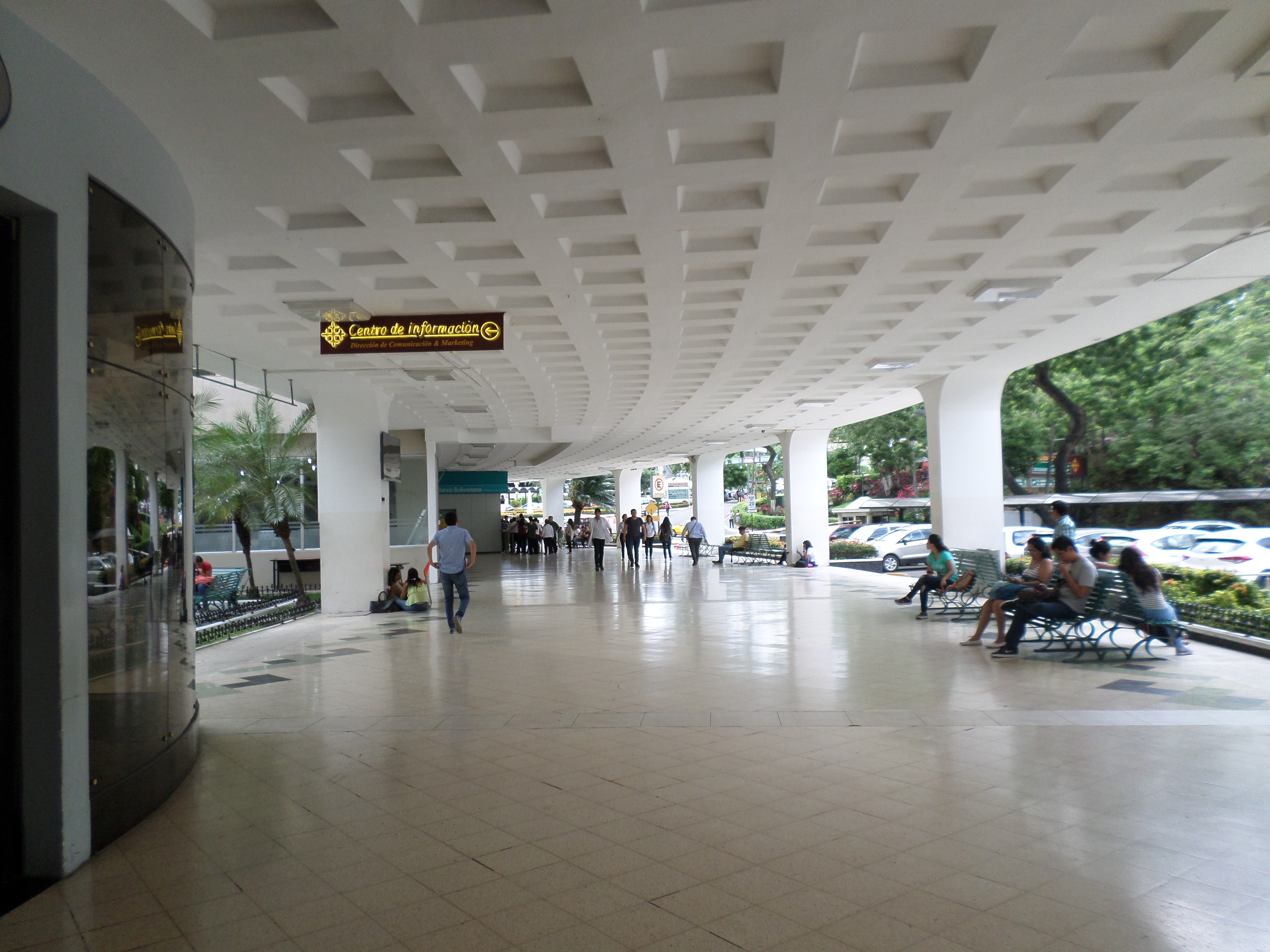 edificio principal